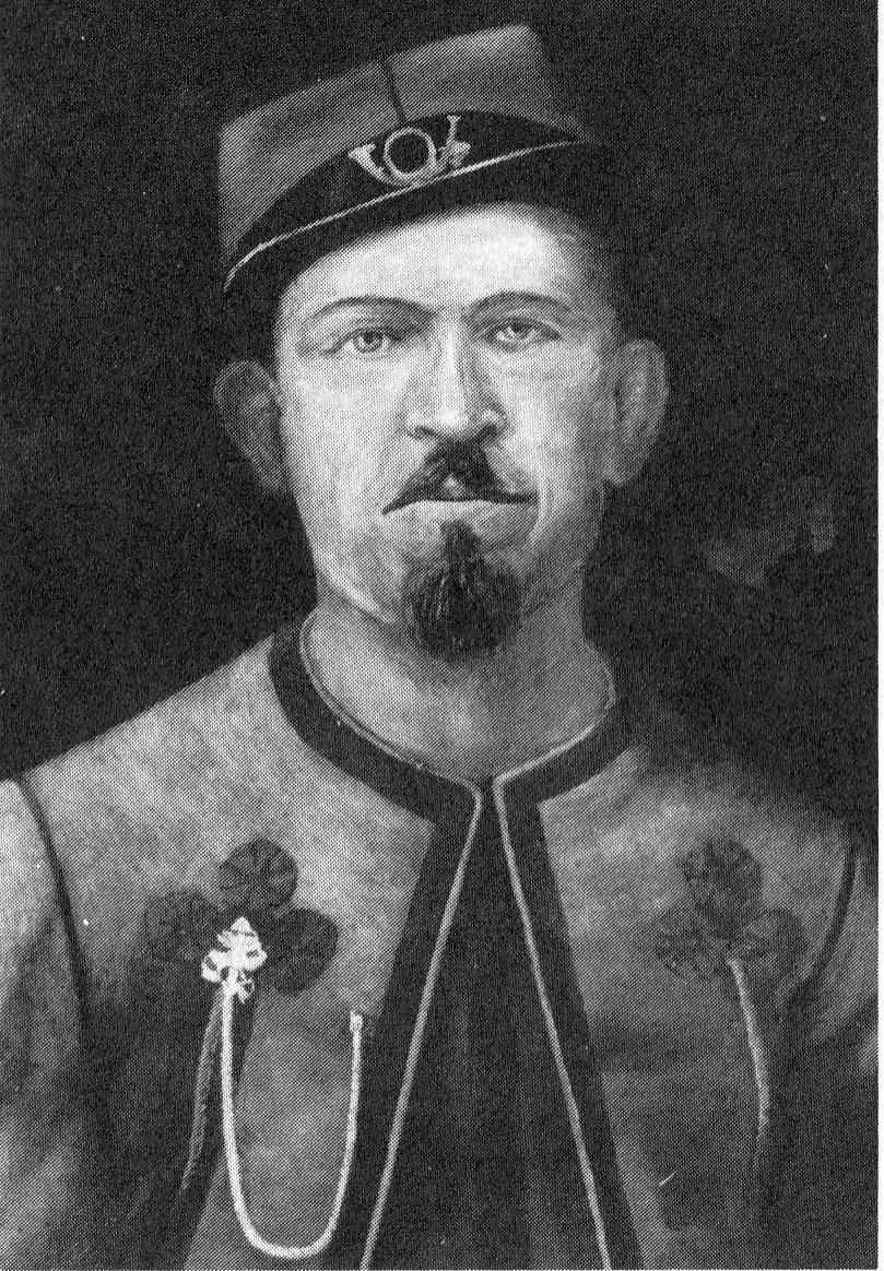 portrait de Zouave pontifical (Réalisé par M. BOUILLO artiste non identifié - vers 1865)